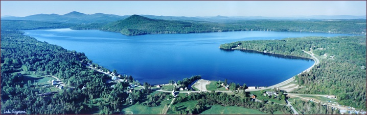 Lake Seymour - Morgan Vermont